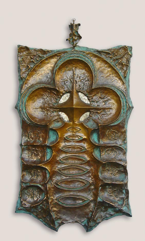 Քանդակագործ` Մարիամ Հակոբյան, Դրախտի դարպասները